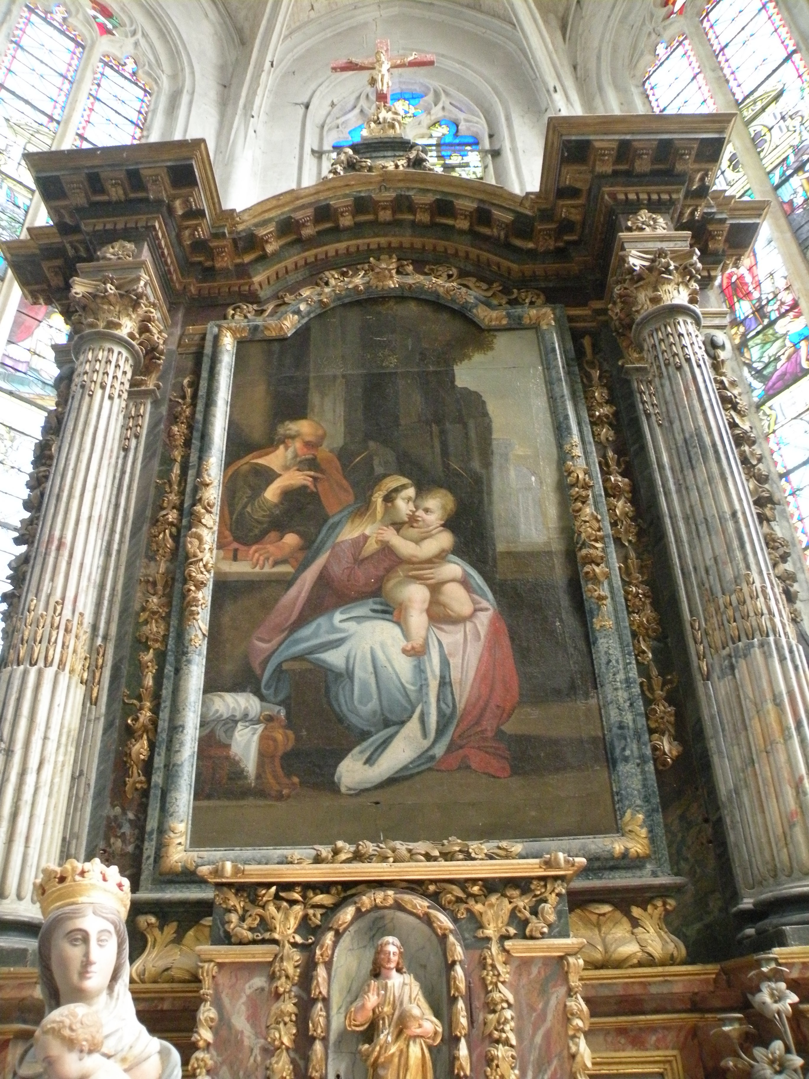 Église Saint-Denis de Sérifontaine detail l'autel principal tableau d'autel : la Sainte Famille